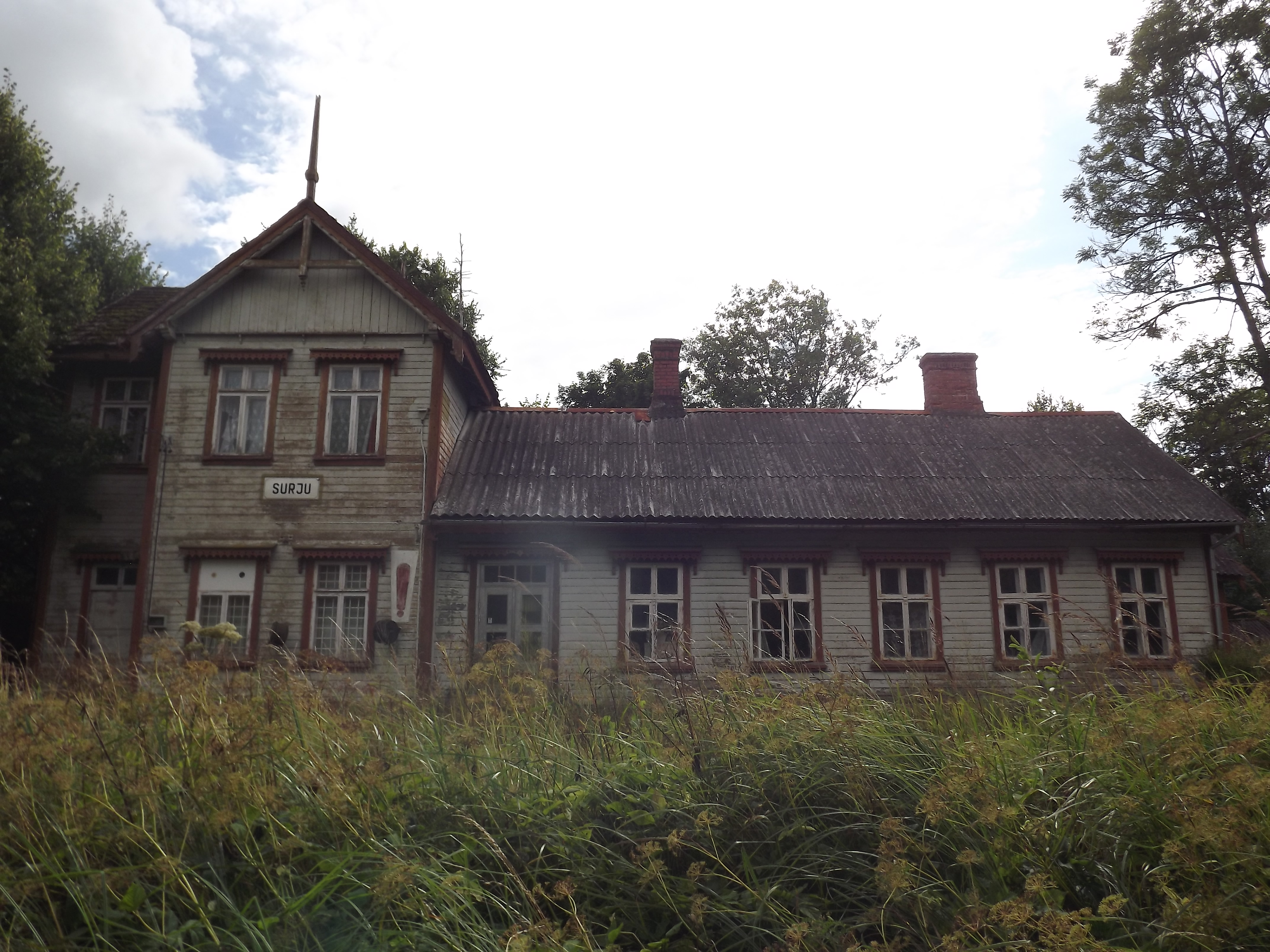 Surju jaamahoone